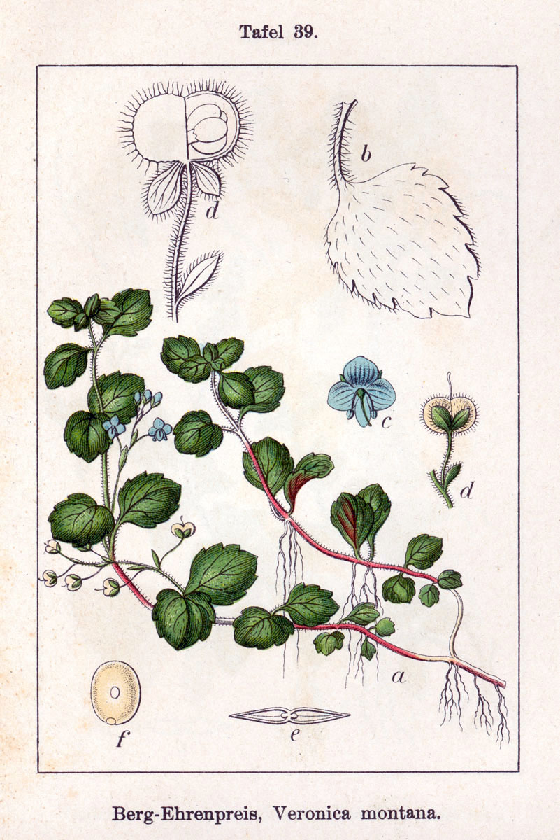 Veronica montana L. Original Description Berg-Ehrenpreis, Veronica montana